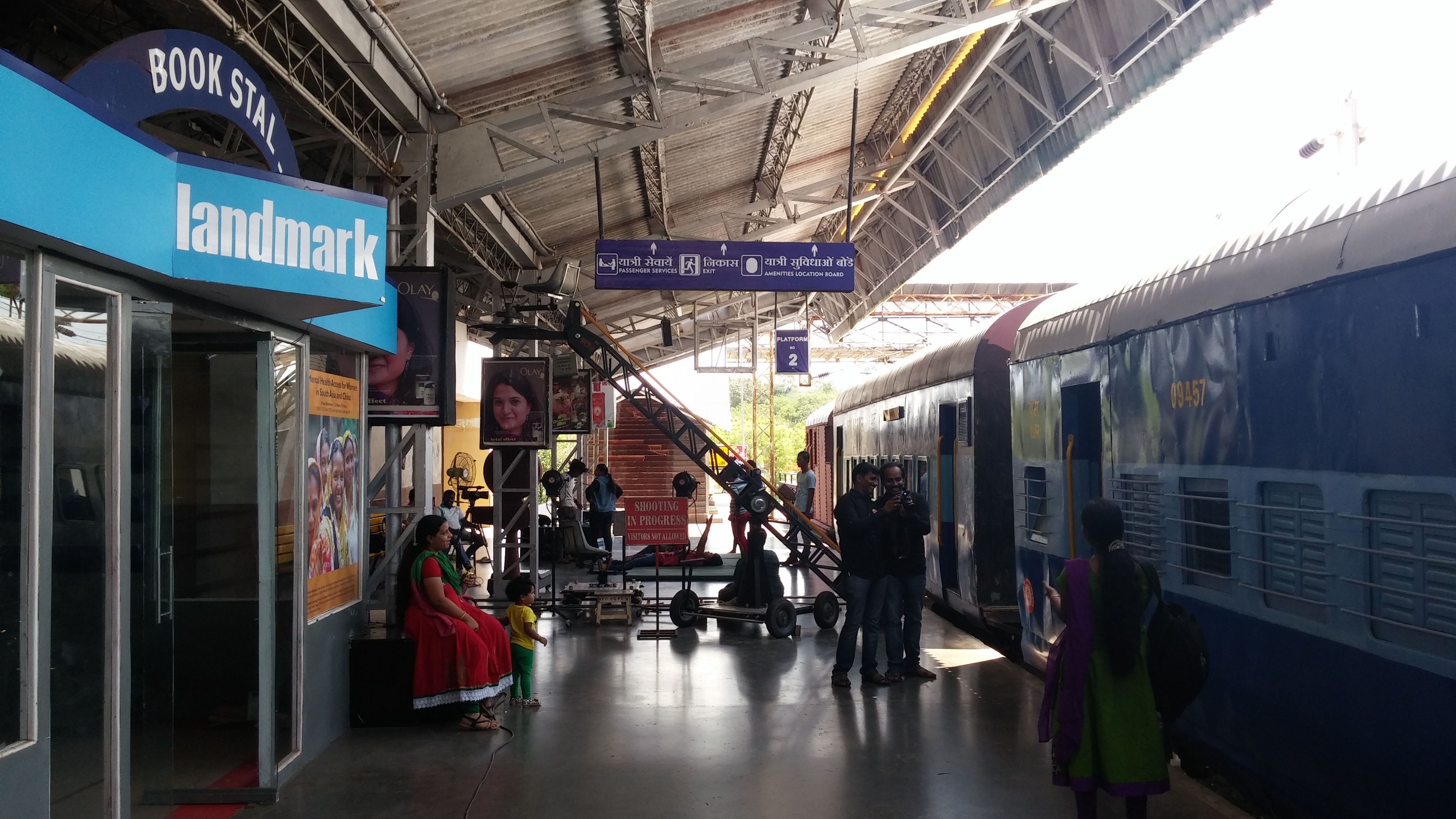 Ramoji Film City - Train station set